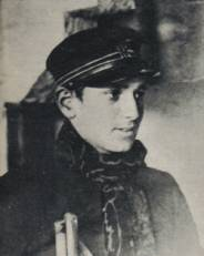 ヴィクトル・スタルヒンの中学時代